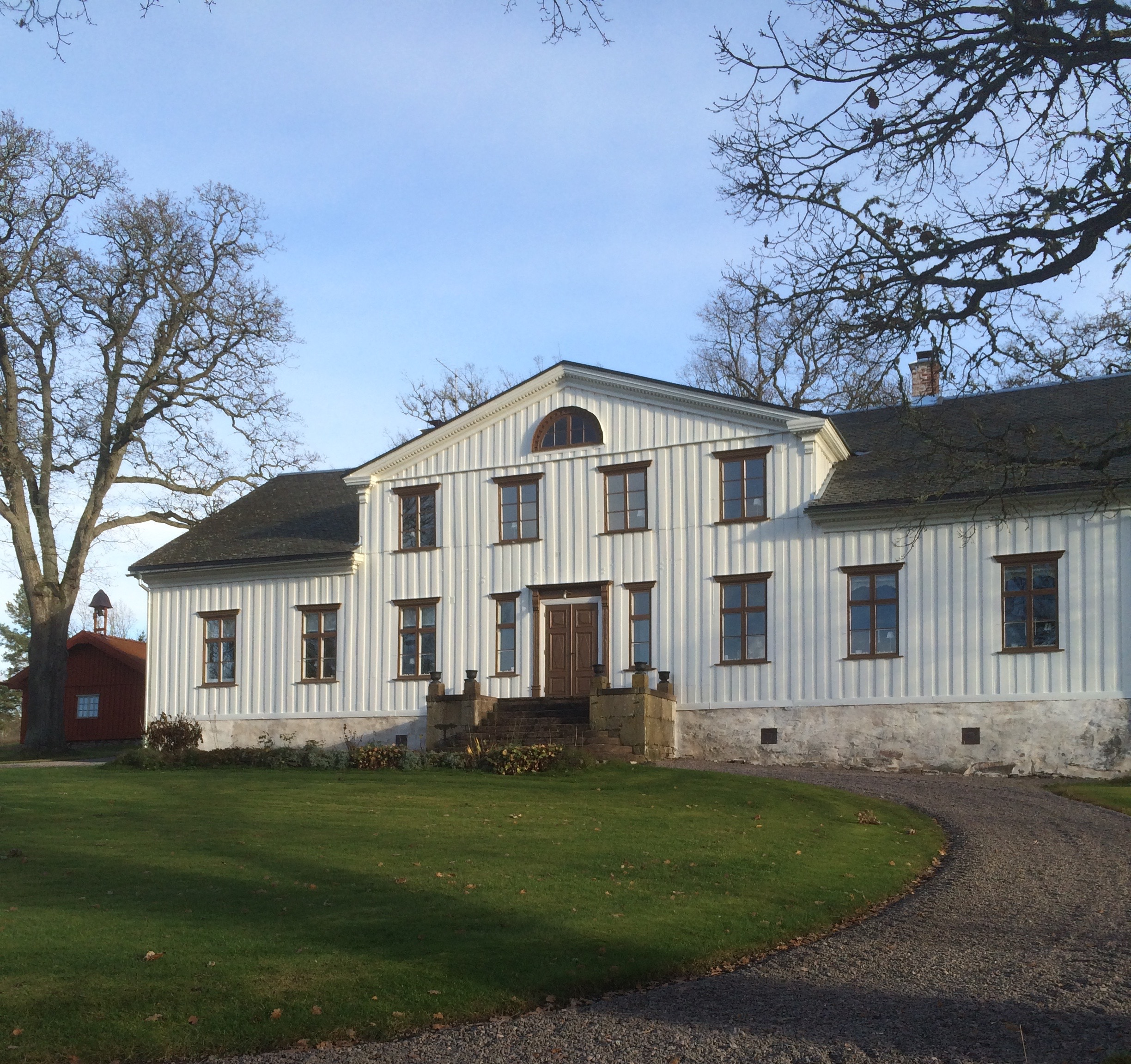 Mangårdsbyggnad Gunneruds gård